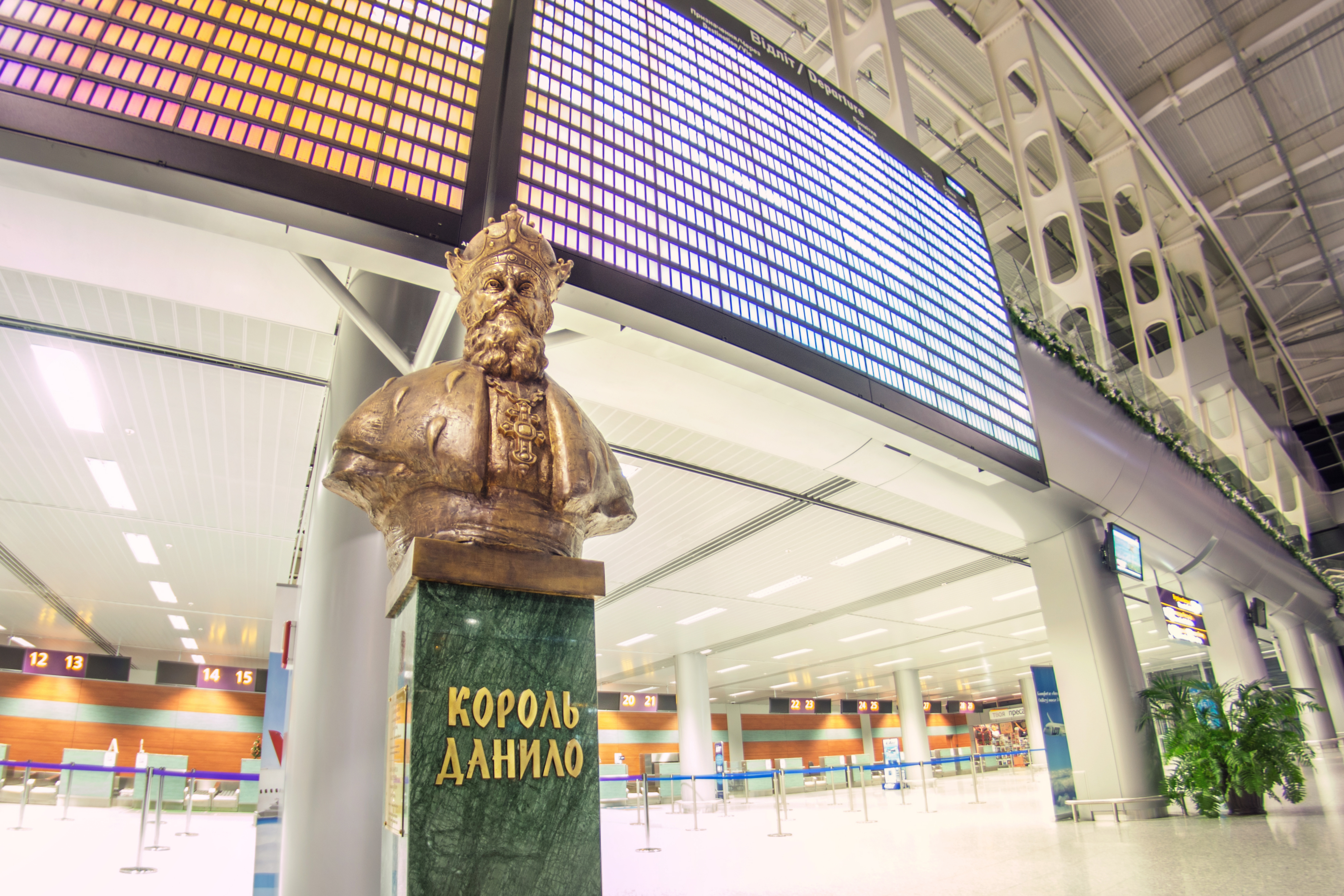 Lviv, Ucrania